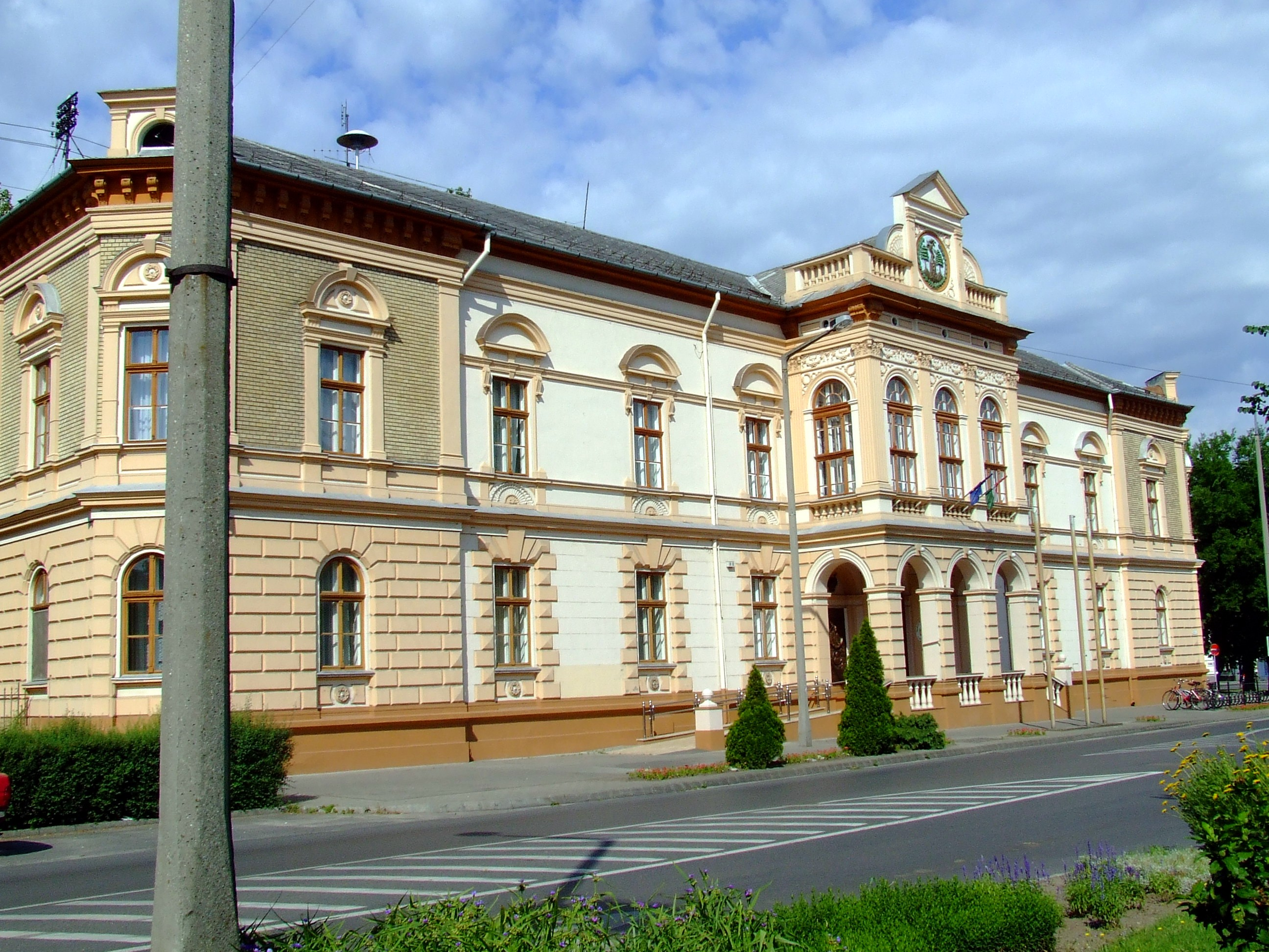 A kiskőrösi városháza épülete. Készült 1893-ban Lehoczki János építőmester tervei alapján. Homlokzatán a város 1884-ből származó címere látható